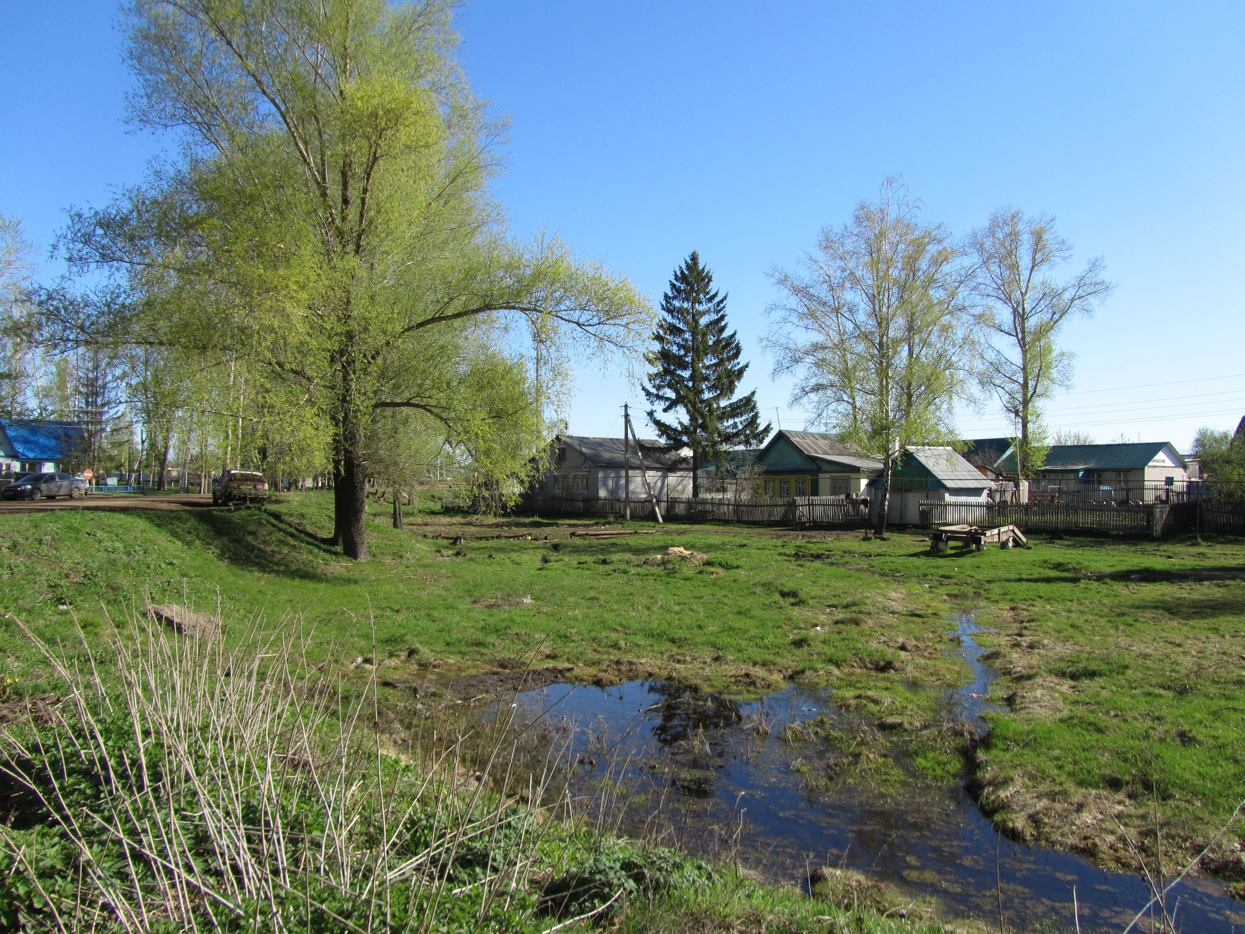 Весна. Татария. Аксубаево. Май 2013